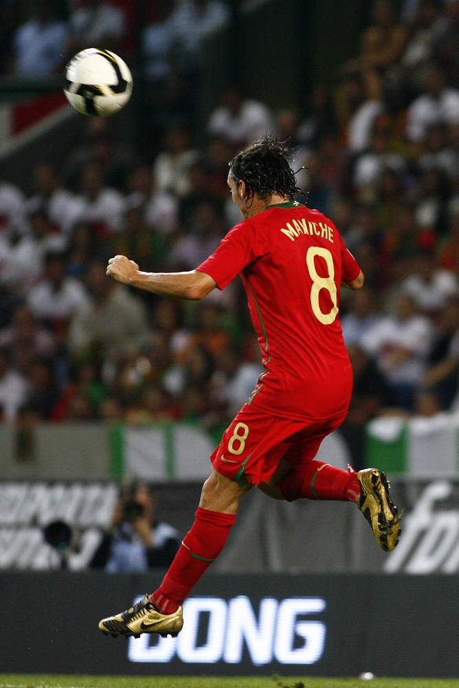 Maniche (8); Portugal 2-3 Denmark, Lisbon September 10 2008